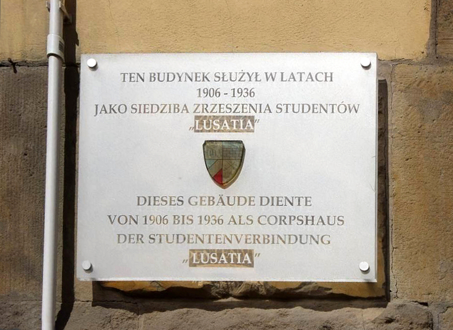 Gedenktafel am früheren Corpshaus der Lusatia Breslau.